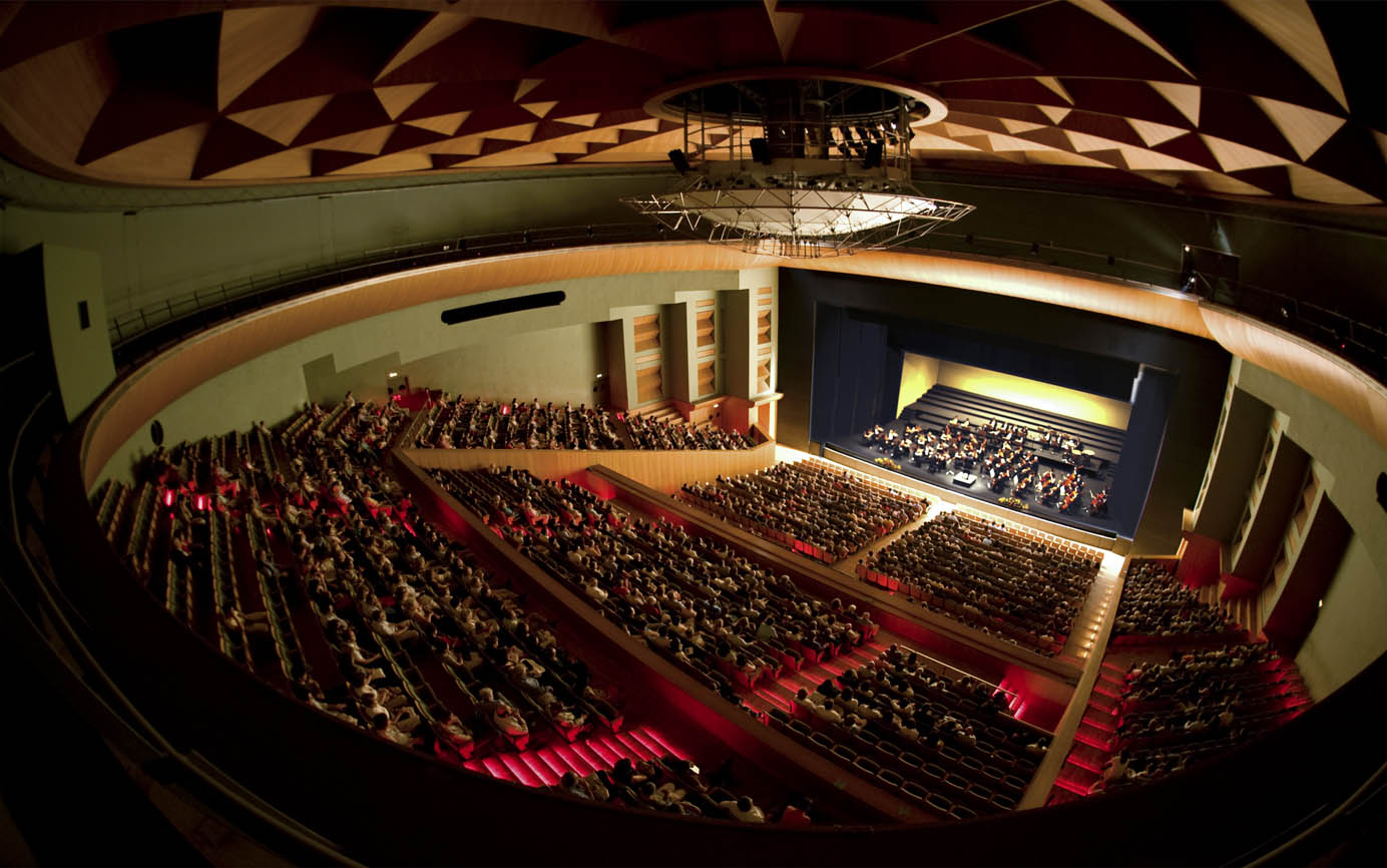 Teatro de la Maestranza, Sevilla